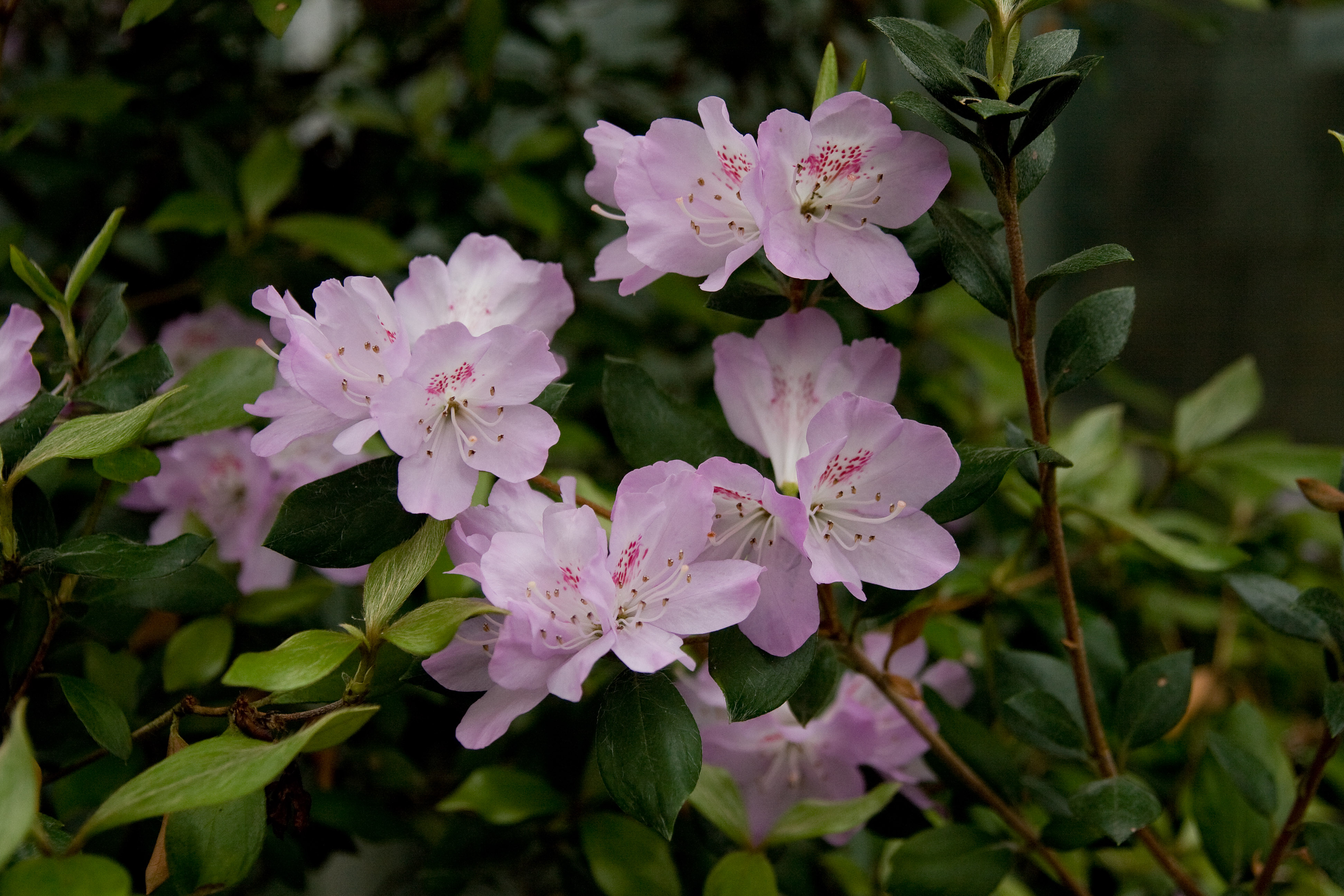 サクラツツジ (学名:Rhododendron tashiroi)